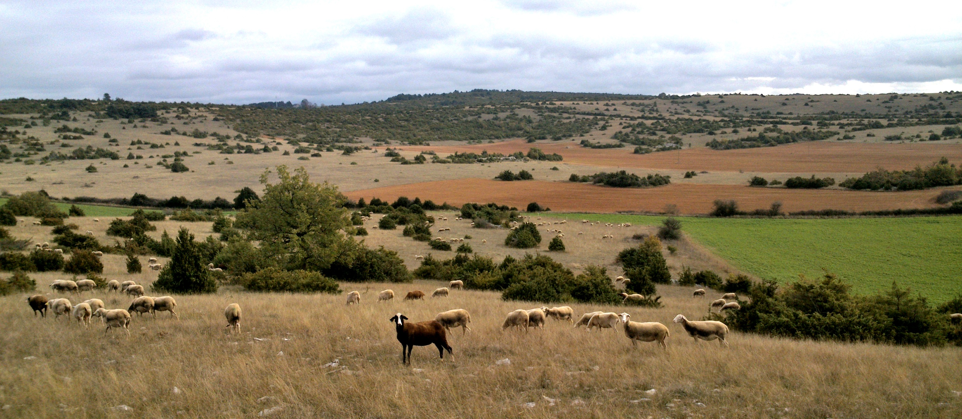 Novembre 2013 entre Labro et Les Brouzes